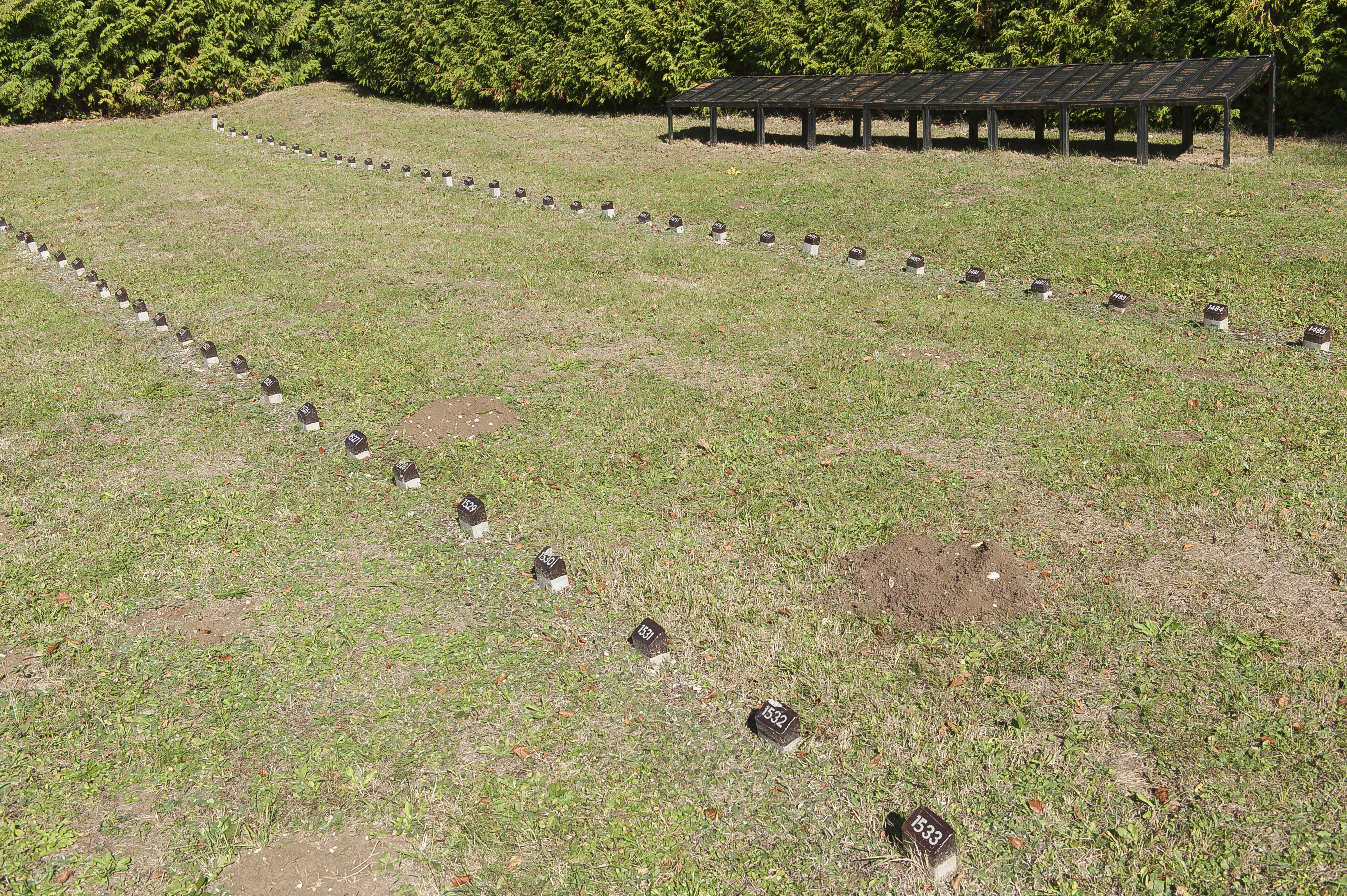 Waldfriedhof Gänsewag auf dem ehemaligen Truppenübungsplatz Münsingen